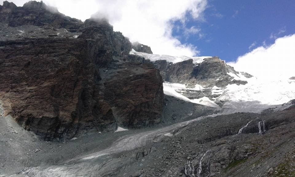 Ambienti glaciali del Gruppo del Monte Rosa (Q49966040)